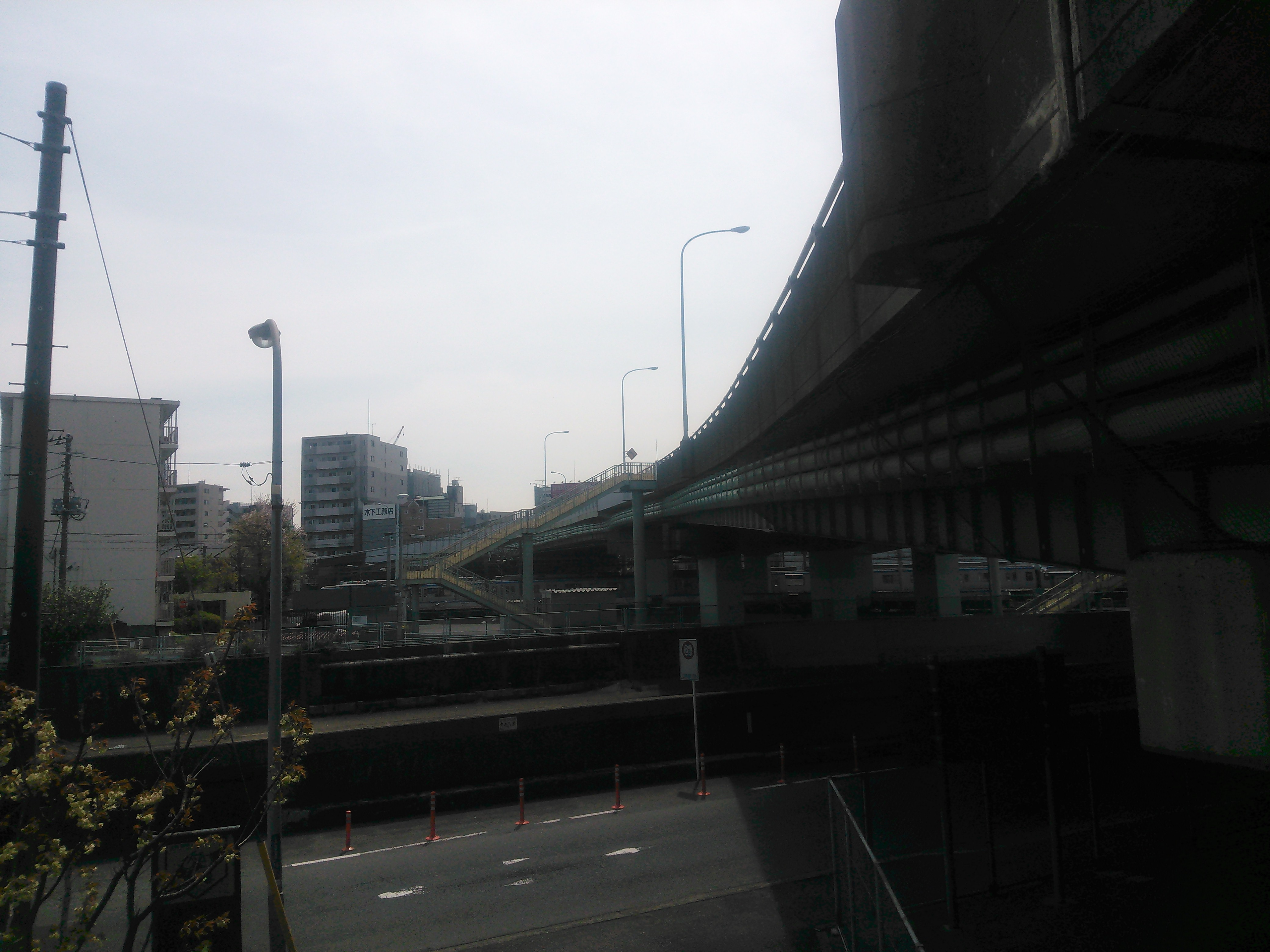 横浜市西区、帷子川に架かる尾張屋橋。橋の下は相鉄線西横浜駅。